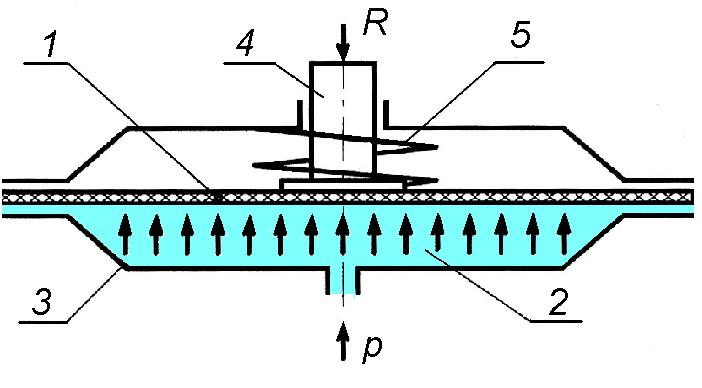 мембранный пневмодвигатель